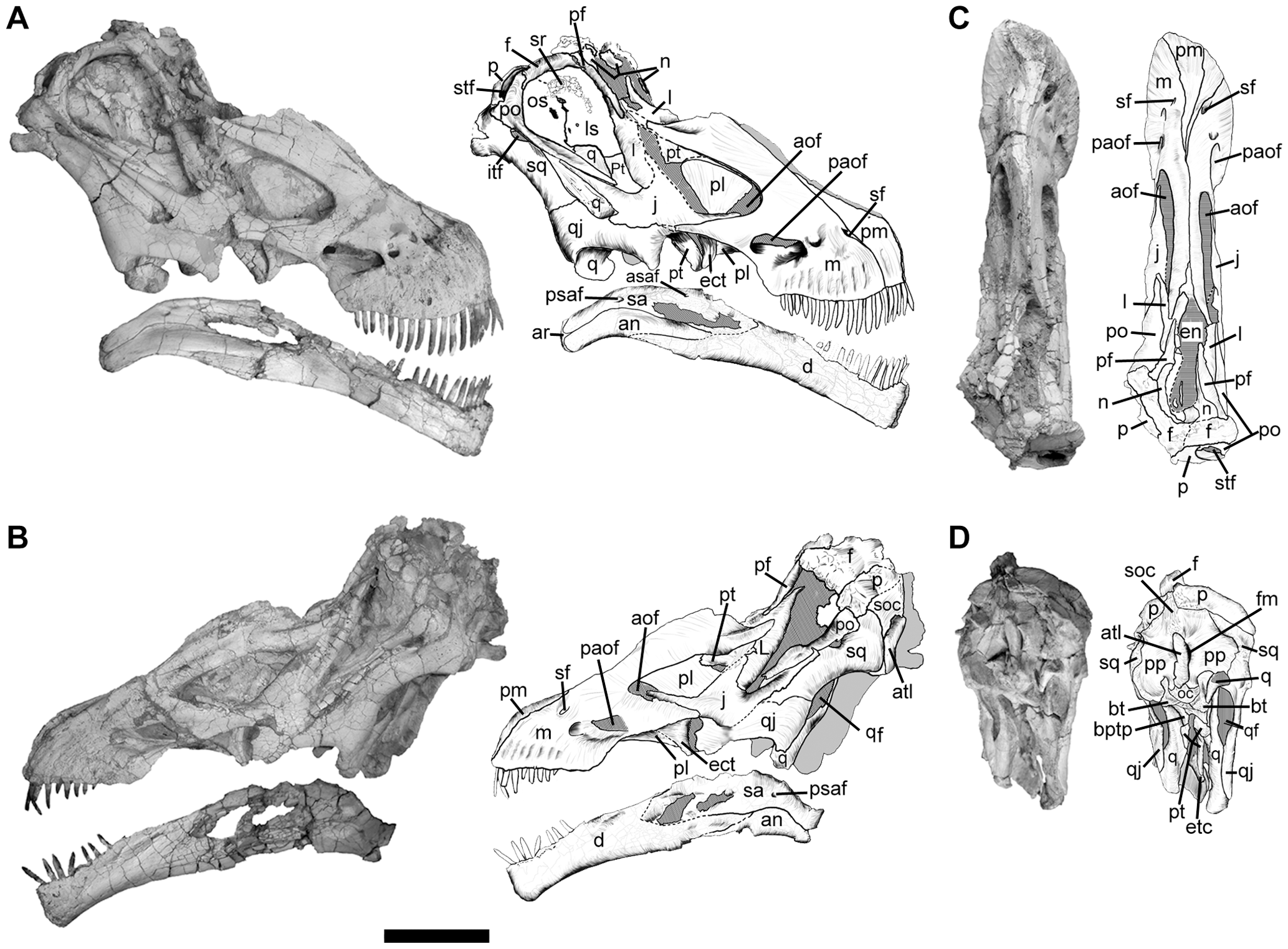 Skull of Tapuiasaurus macedoi, gen. n. sp. n. Photographs and half-tone drawings of the skull of the holotype MZSP-PV 807 in right lateral view (A), left lateral view (B), dorsal view (C), and occipital view (D). Abbreviations: an, angular; aof, antorbital fenestra; ar, articular; asaf, anterior surangular foramen; atl, atlas; bt, basal tubera; bptp, basipterygoid process; d, dentary; ect, ectopterygoid; en, external nares; f, frontal; fm, forame magnum; itf, infratemporal fenestra; j, jugal; l, lacrimal; ls, latrosphenoid; m, maxilla; n, nasal; oc, occipital condyle; os, orbitosphenoid; p, parietal; paof, preantorbital fenestra; pf, prefrontal; pl, palatine; pm, premaxilla; po, postorbital; pp, paroccipital process; psaf, posterior surangular foramen; pt, pterygoid; q, quadrate; qf, quadrate foramen; qj, quadratojugal; sa, surangular; sf, subnarial foramen; soc, supraoccipital; sq, squamosal; sr, sclerotic ring; stf, supratemporal fenestra. Scale bar represents 10 cm.